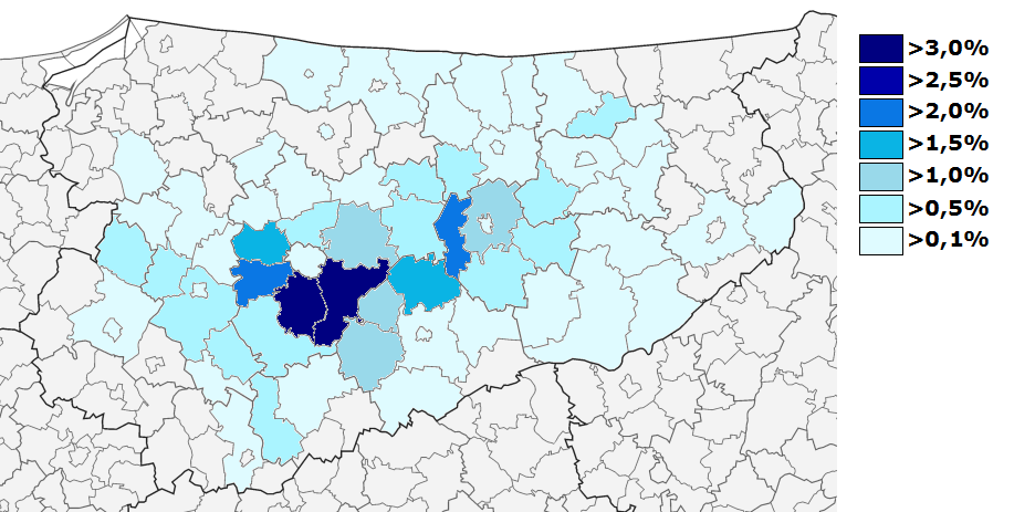 Deutsche Minderheit in Masuren und Ermland (Südhälfte Ostpreußens) Nach der Volkszählung 2002 Quellen der Prozentzahlen: Polnisches Statistikamt